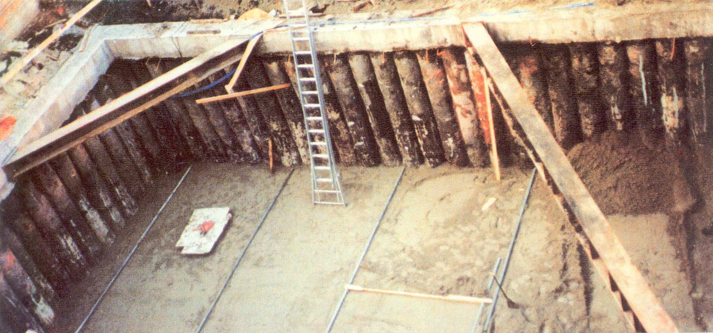 Bouwput met palenwand.